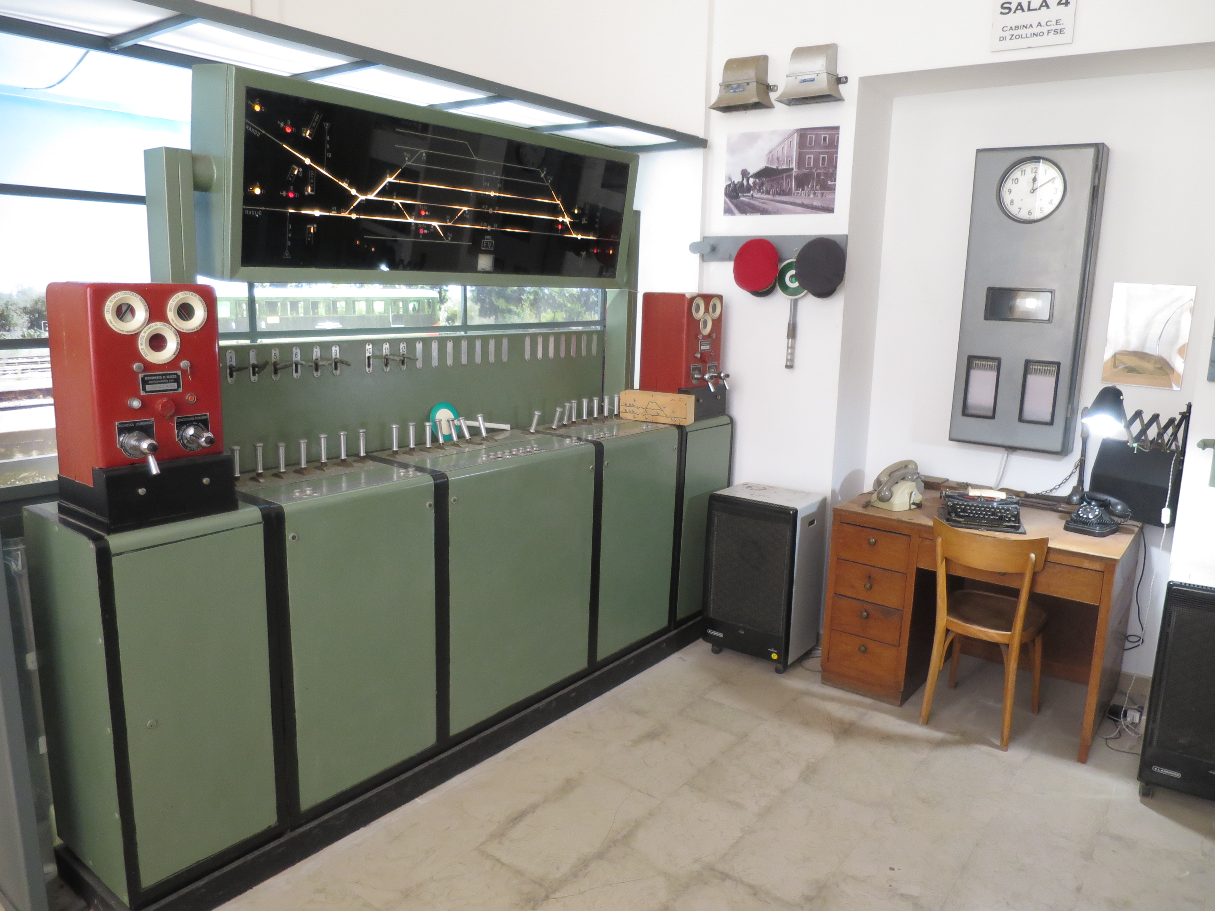 Arbeitsplatz des Fahrdienstleiters aus dem Bahnhof Zollino der FS